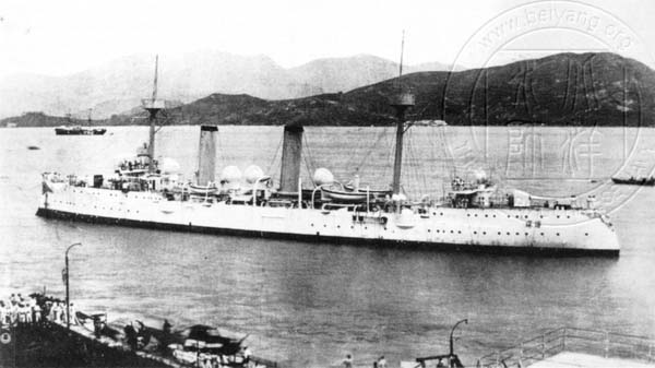 Крейсер "Хай-Чжень". Фото